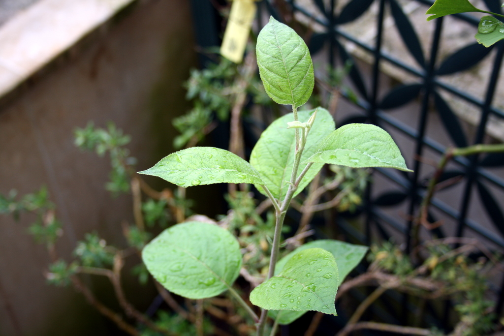 Pomme 'Galeuse' - Apple